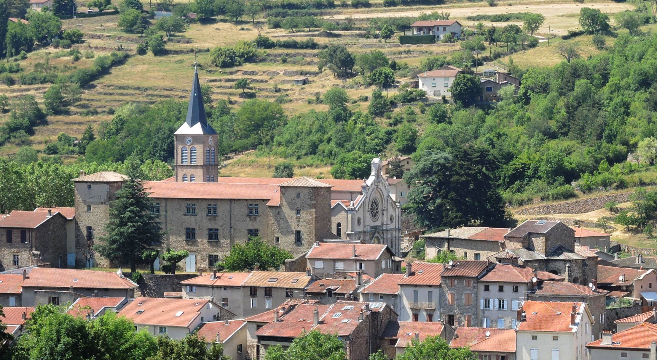 Satillieu vue sud